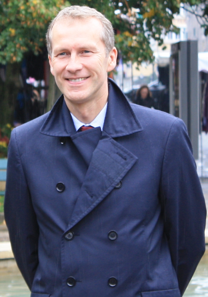 Guillaume Garot à Laval le 6 Octobre 2012.